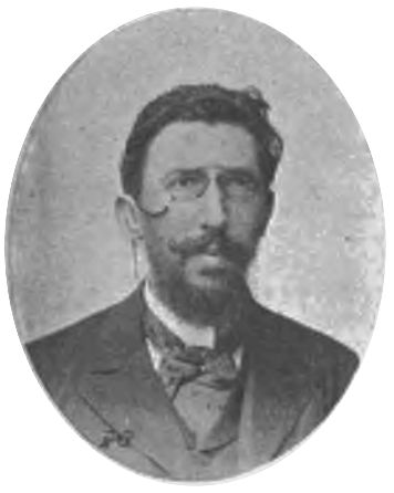 grafika z książki PL "Pan Zagłoba i Dyogenes"